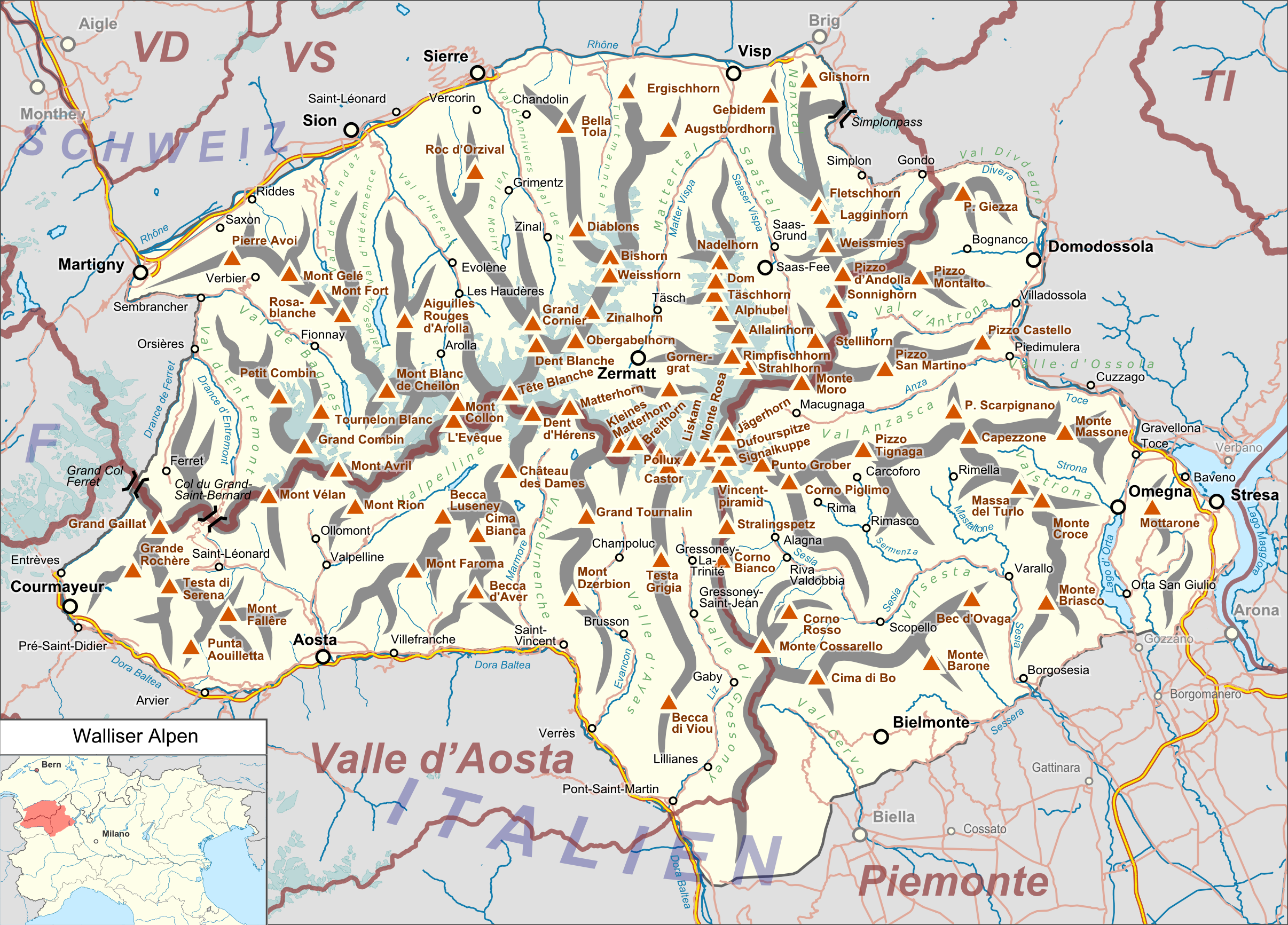 Lagekarte der Walliser Alpen